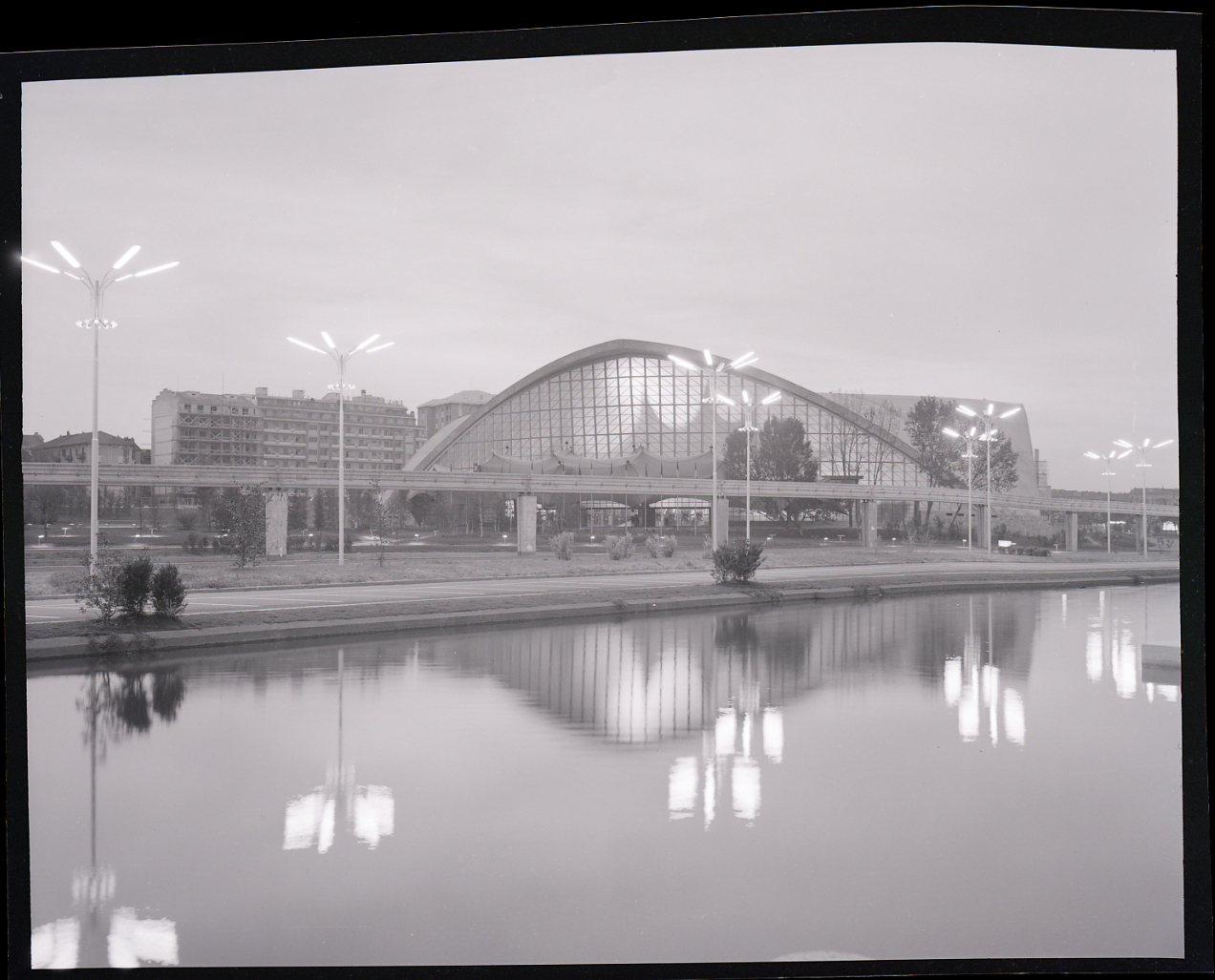 Servizio fotografico : Torino, 1961 / Paolo Monti. - Buste: 7, Fototipi: 7 : Negativo b/n, gelatina bromuro d'argento/ pellicola ; 10x12. - ((Serie costituita da 4 negativi identificati con i nn.: 4257-4263. La suddetta serie è contenuta nella scatola identificata con la numerazione 4132-4341G. - Occasione: Documentazione dell'esposizione internazionale Italia '61 tenutasi a Torino in occasione del centenario dell'unità d'Italia. - Fonte: Rubrica di Paolo Monti: Archivio 10x12 (ultimi numerati) - dal G1 al (s.d.), presso Archivio Paolo Monti